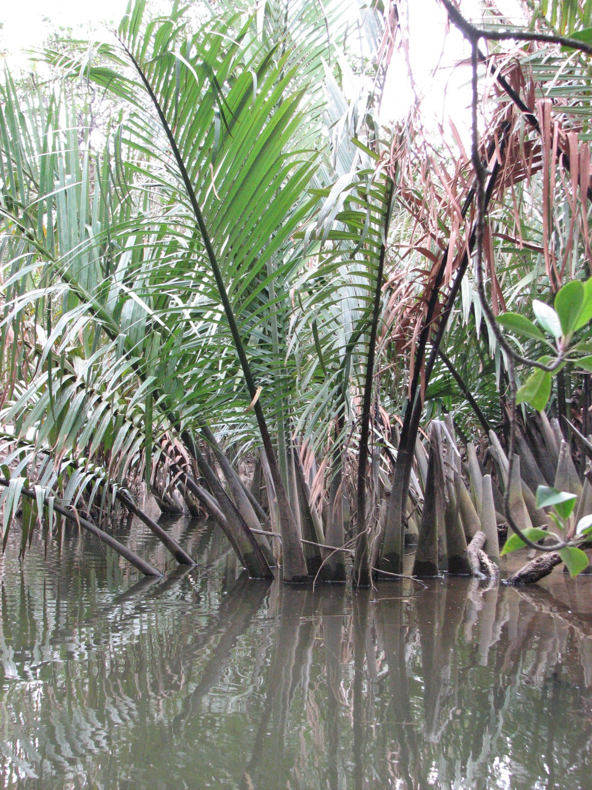 ニッパヤシ(天然記念物・船浦のニッパヤシ群落)(mangrove pine in Japan)